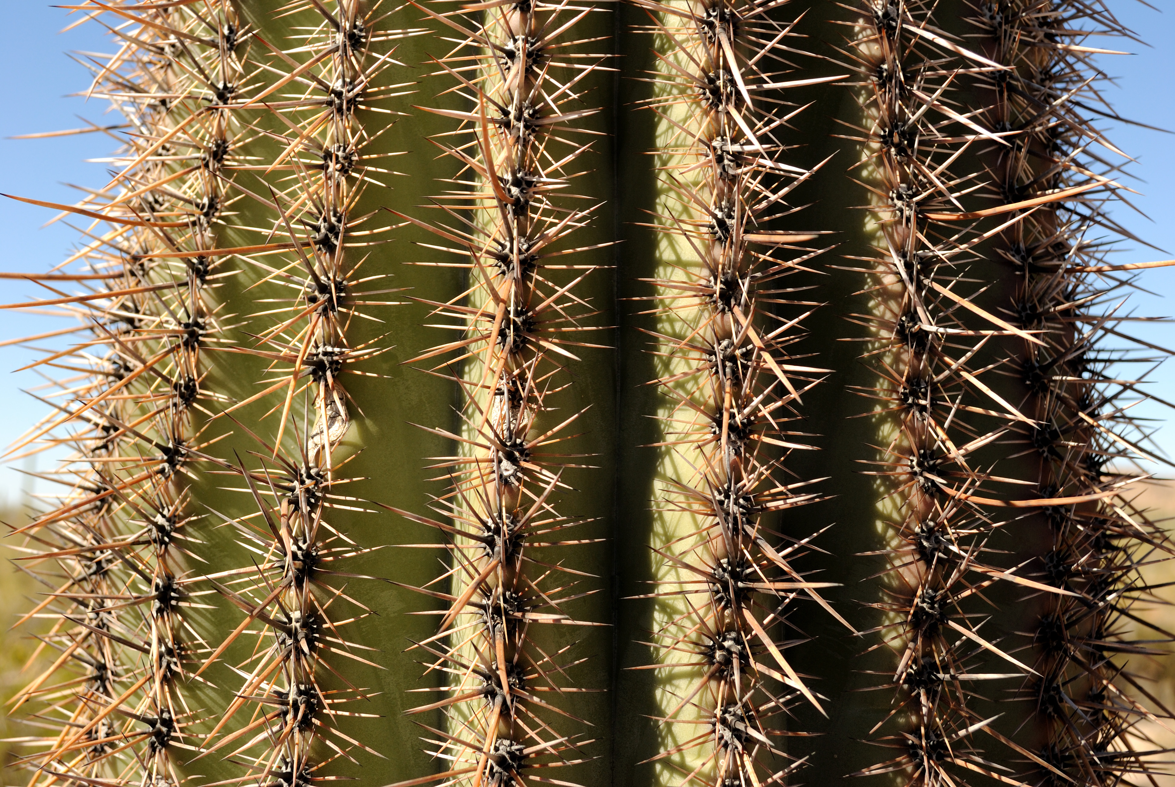 Saguaro trunk - close up